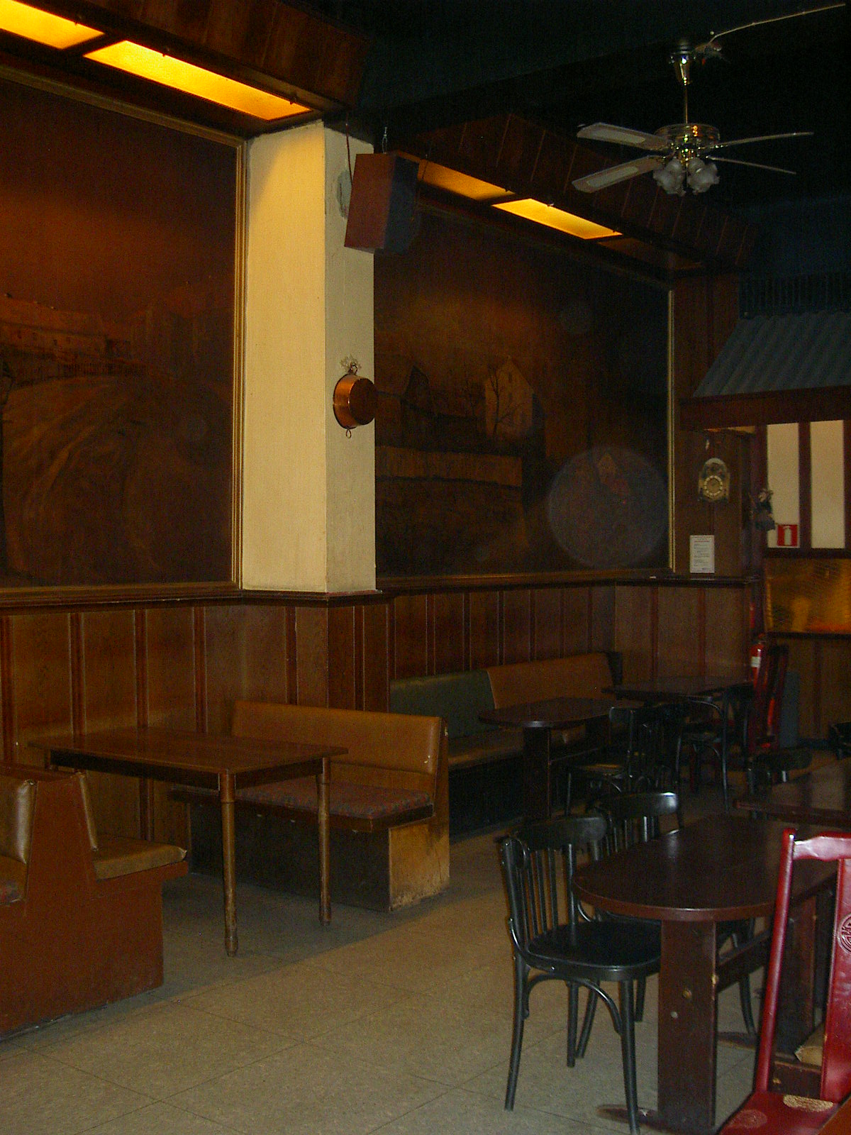 Fra serveringsstedet Lompa i Oslo.